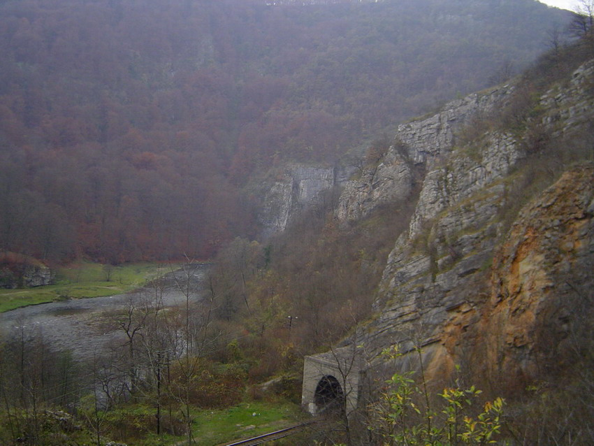 Şuncuiuş